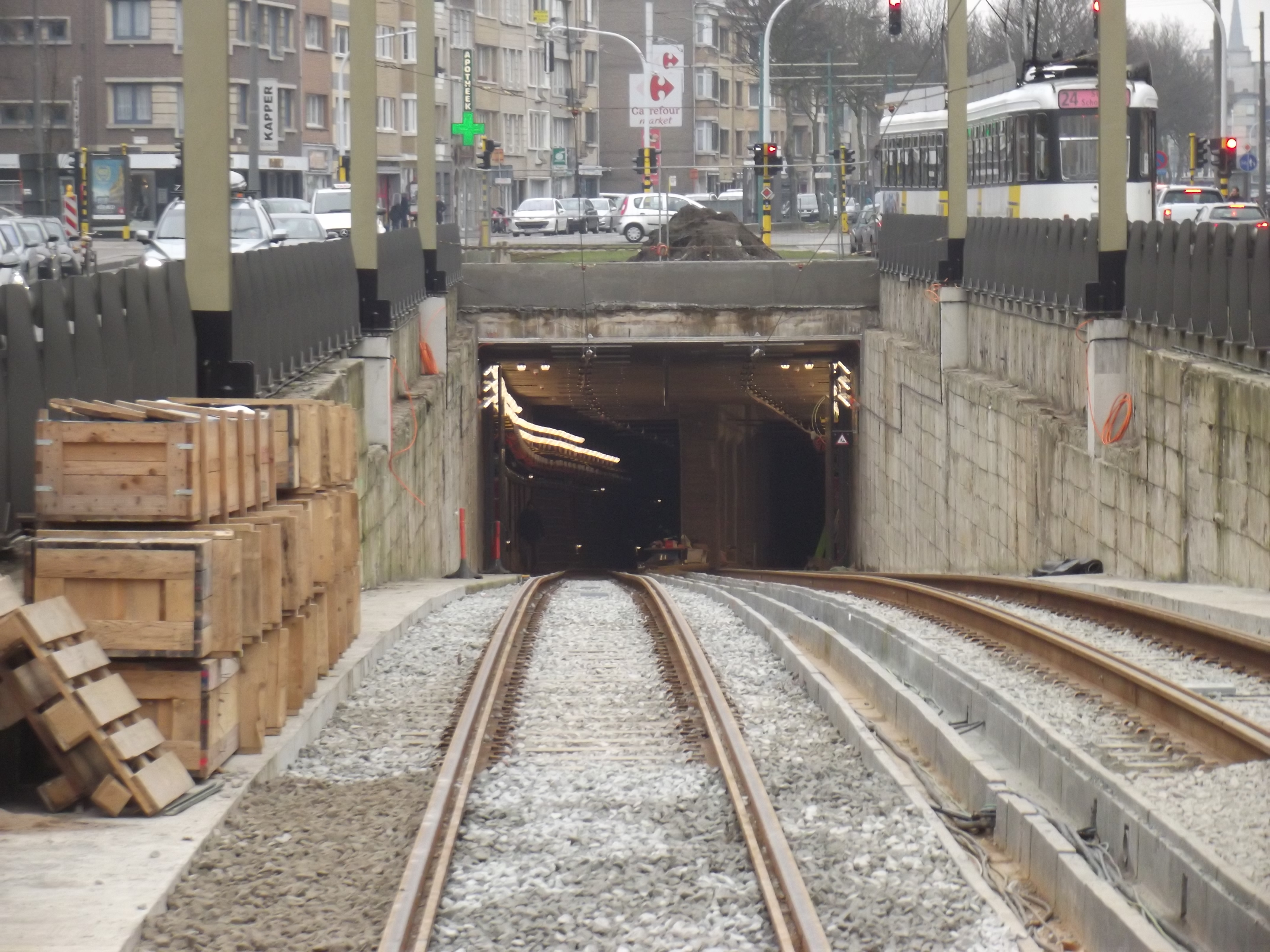 De ingang van de Reuzenpijp al voorzien van sporen in februari 2015